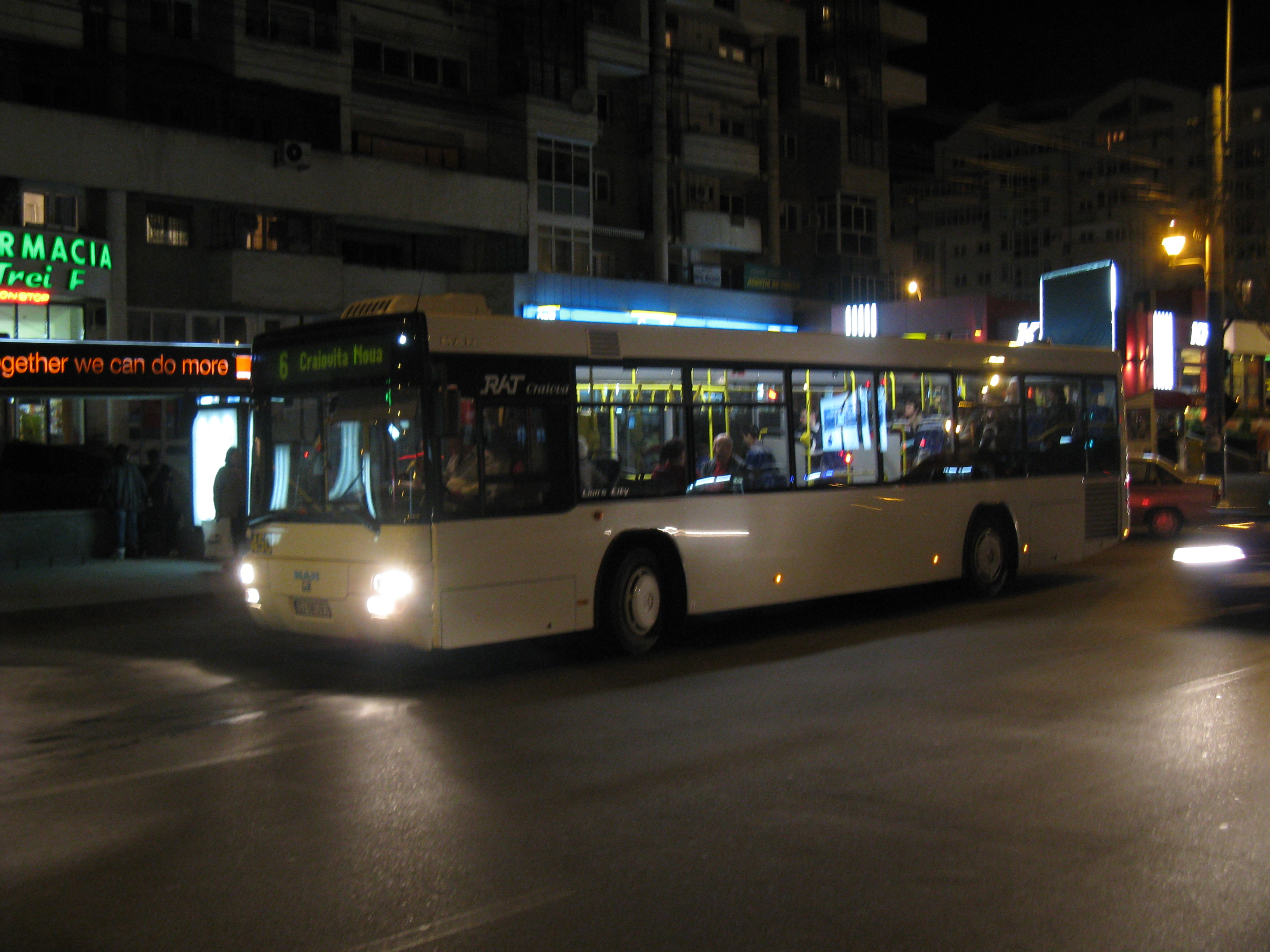 Autobuz MAN circulând pe linia lui 6.